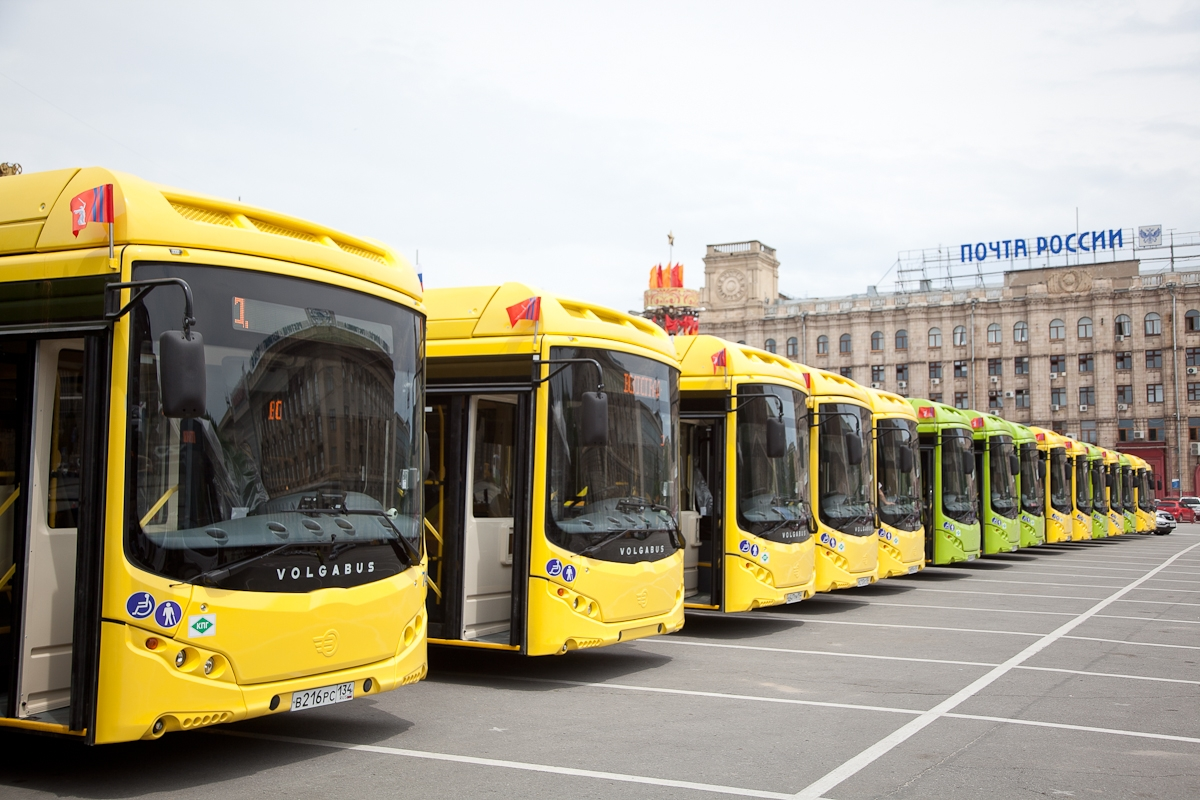 Жёлтые автобусы Volgabus-5270.G2 в Волгограде